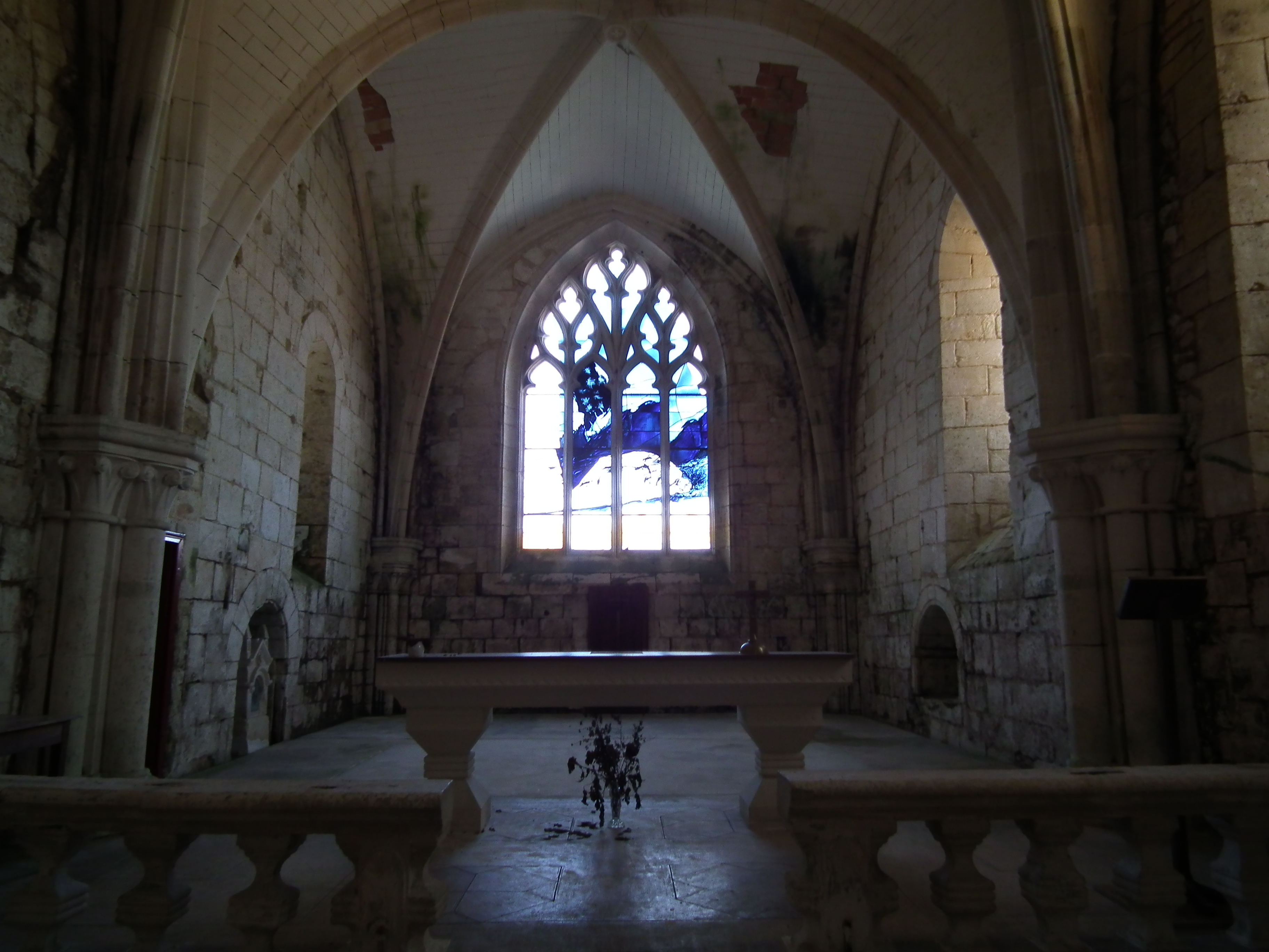 Intérieur de l'église d'Agudelle